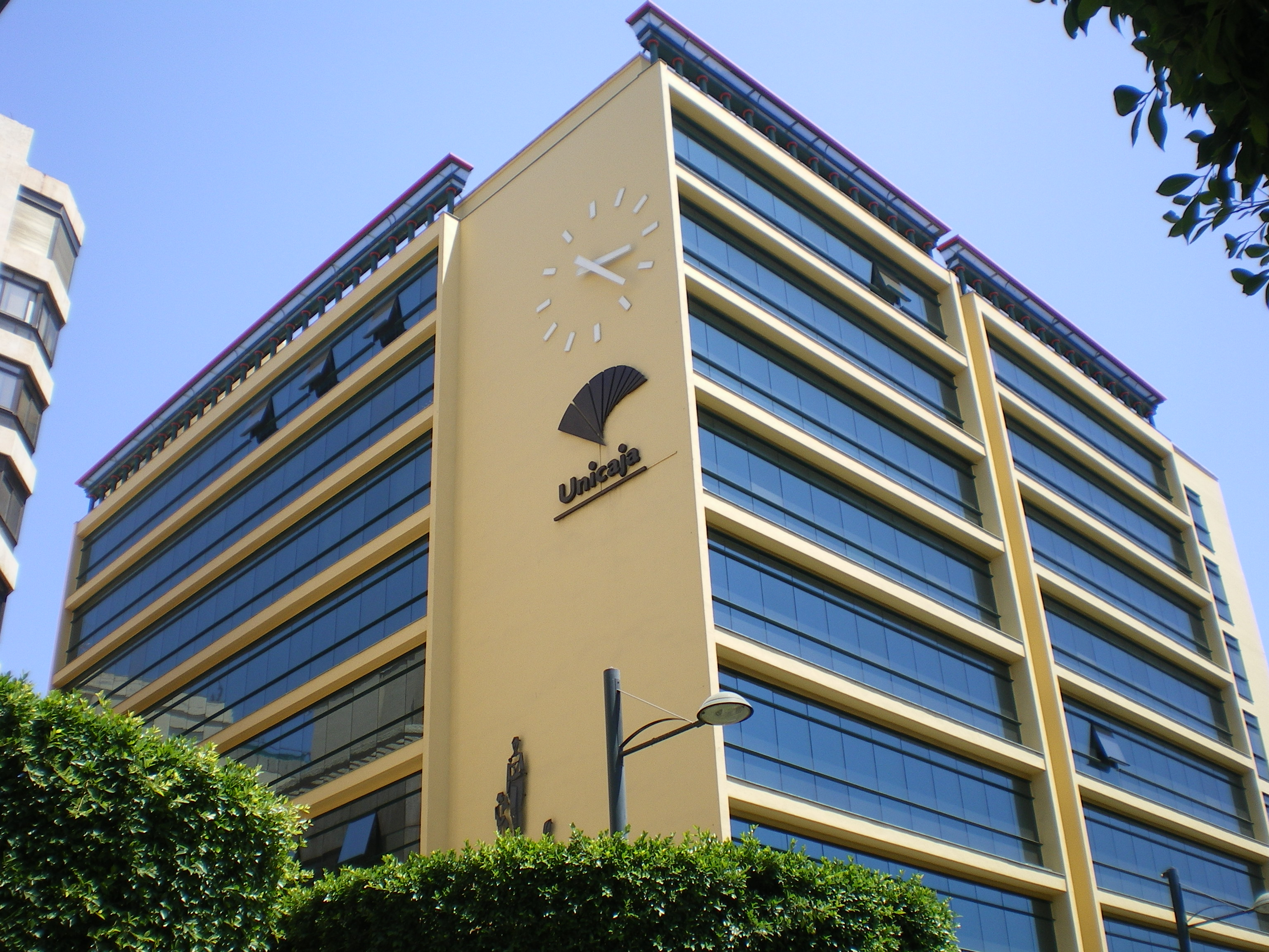 Fotografía de la oficina central de la Caja de Ahorros, ahora Unicaja, de Almería, Andalucía, España, desde el Paseo.